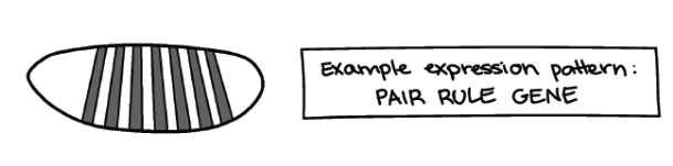 pair